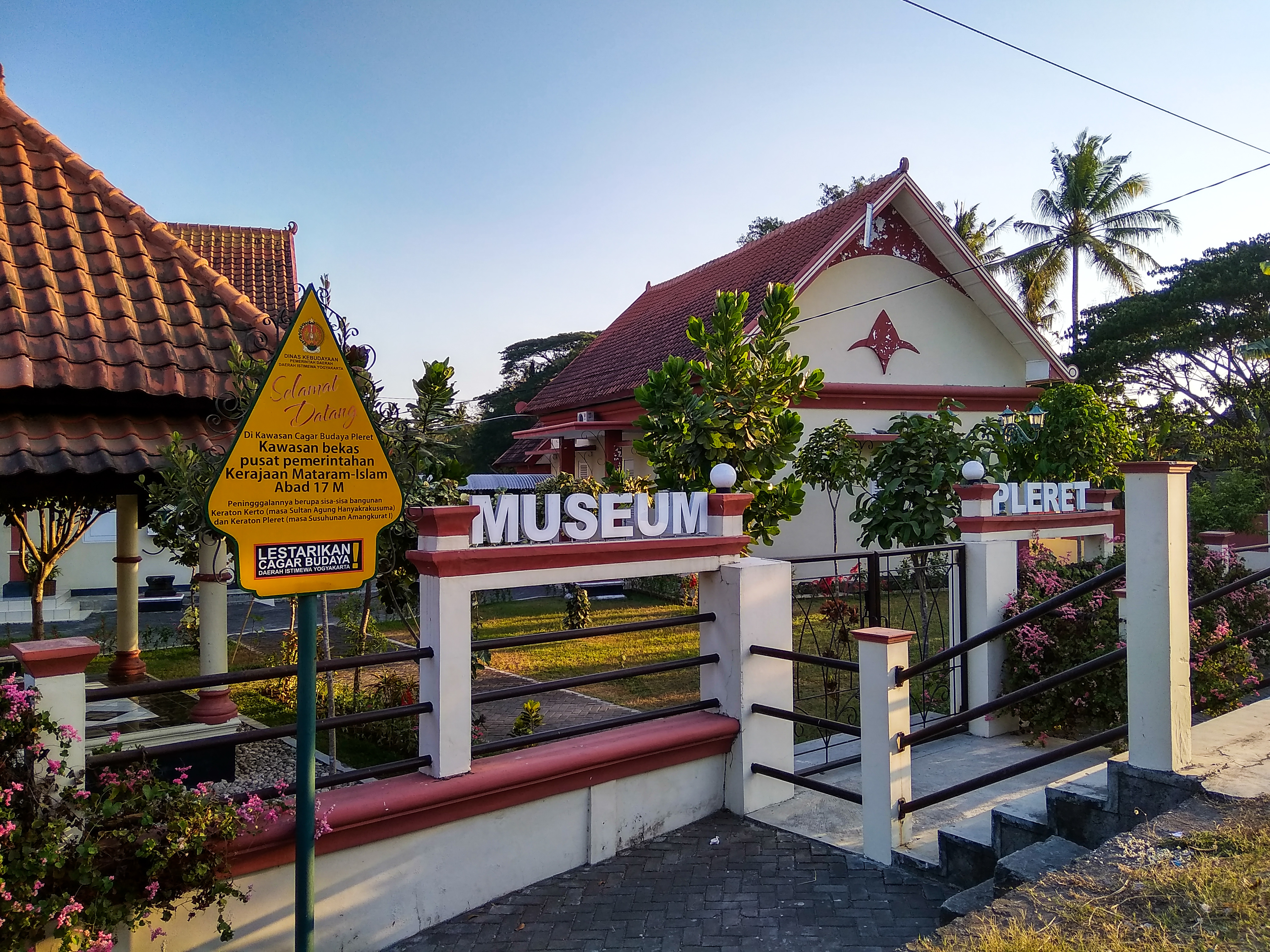 Museum Sejarah Purbakala Pleret dibangun sejak tahun 2007 dan mulai dibuka untuk umum pada tanggal 10 Maret 2014. Museum yang berada di KCB (Kawasan Cagar Budaya) Pleret ini terletak di Jalan Raya Pleret, Kecamatan Pleret, Kabupaten Bantul.